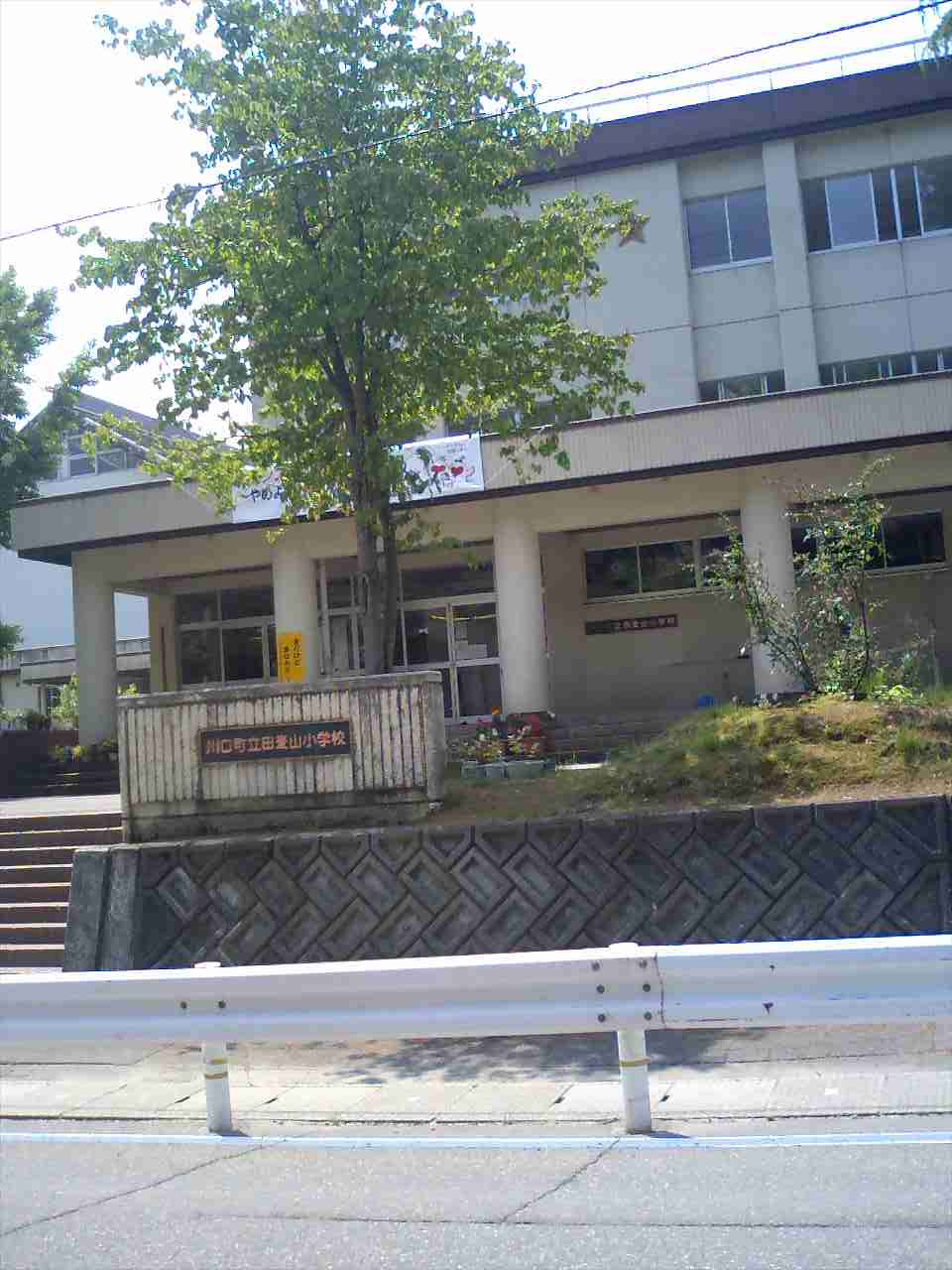 この画像は2007年6月6日投稿者によって、新潟県北魚沼郡川口町大字田麦山（現在の新潟県長岡市大字川口田麦山）にて撮影された、川口町立田麦山小学校（2008年3月23日閉校）の正面入口の写真。